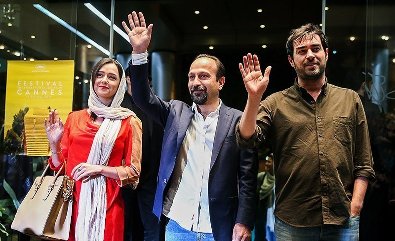 نشست خبری فیلم سینمایی فروشنده با حضور اصغر فرهادی کارگردان و شهاب حسینی و ترانه علیدوستی بازیگران این فیلم شامگاه دوشنبه ۱۰ خرداد ۱۳۹۵ در خانه همایش